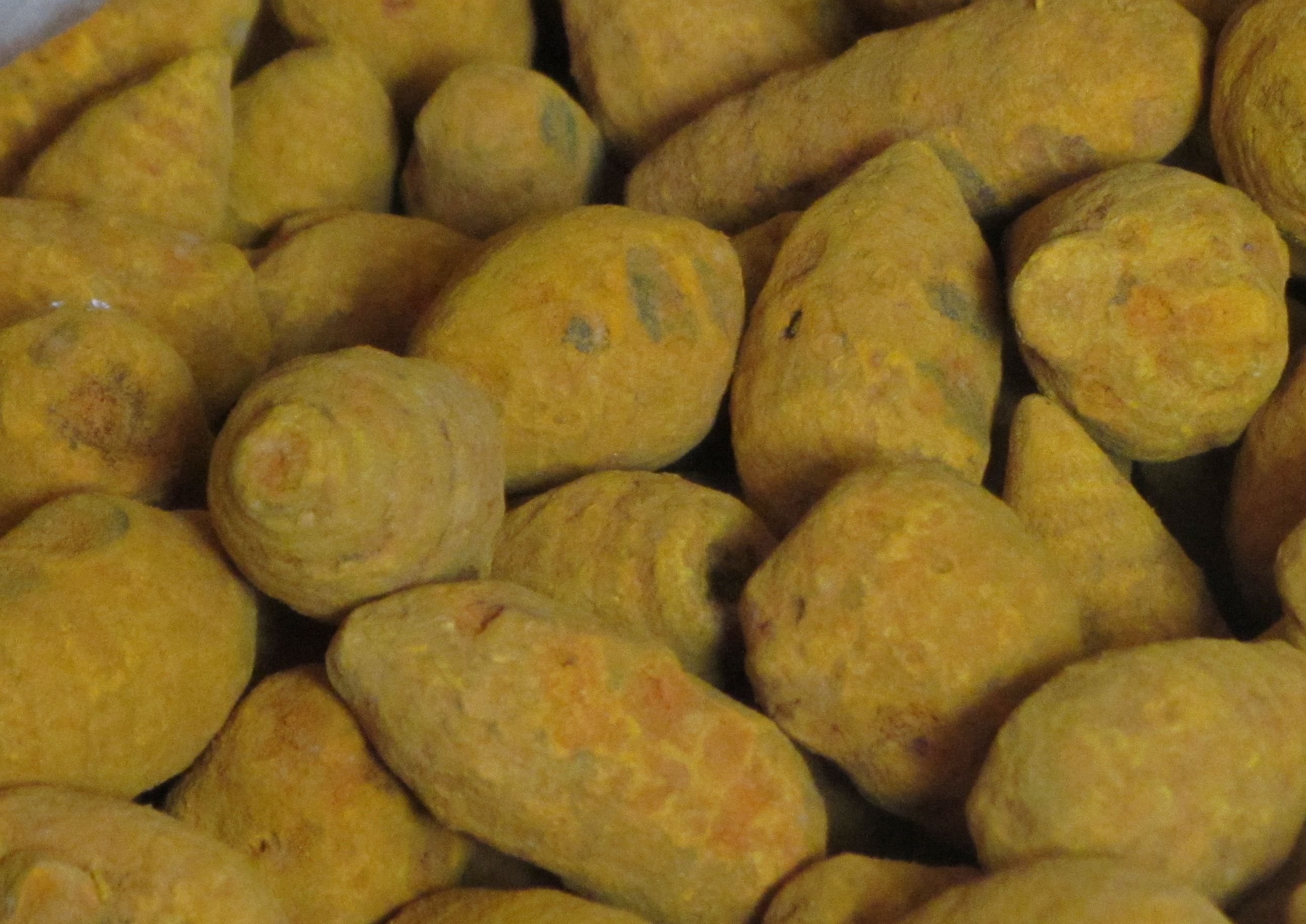 மகளிர் மேனியில் பூசிக் குளிக்கும் மஞ்சள்